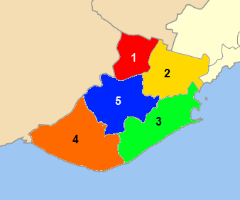 Ενότητες του Δήμου Παγγαίου